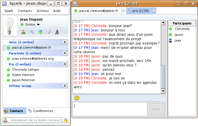 Copie d'écran de Spark